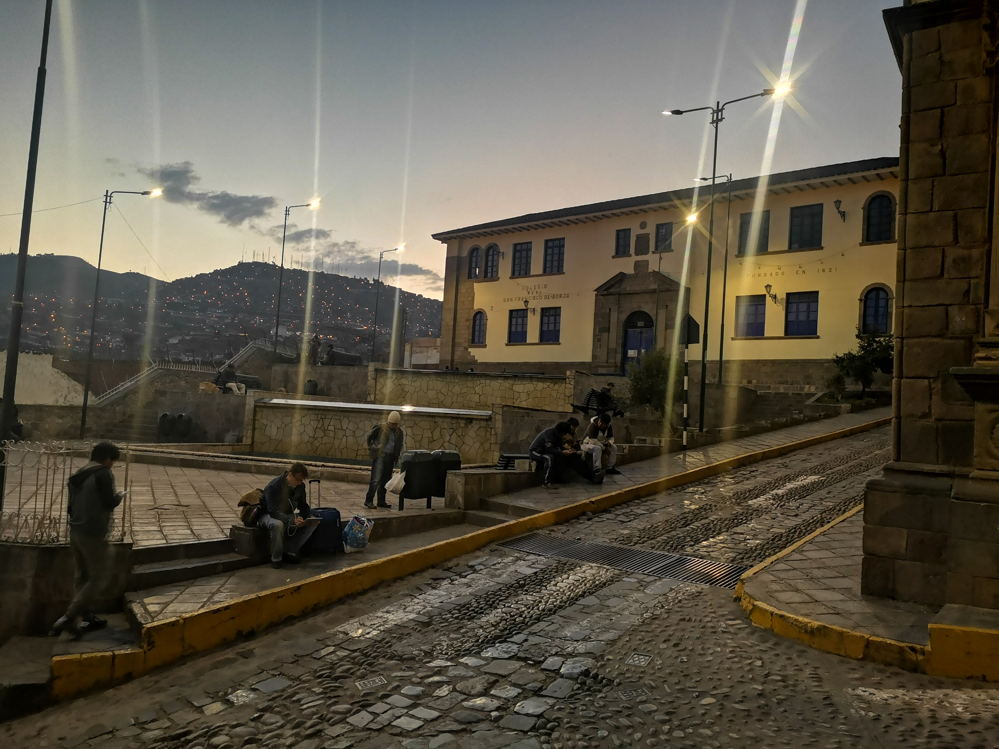 Vista de la plazoleta Tricentenario y del Colegio San Francisco de Borja, Cusco, Perú